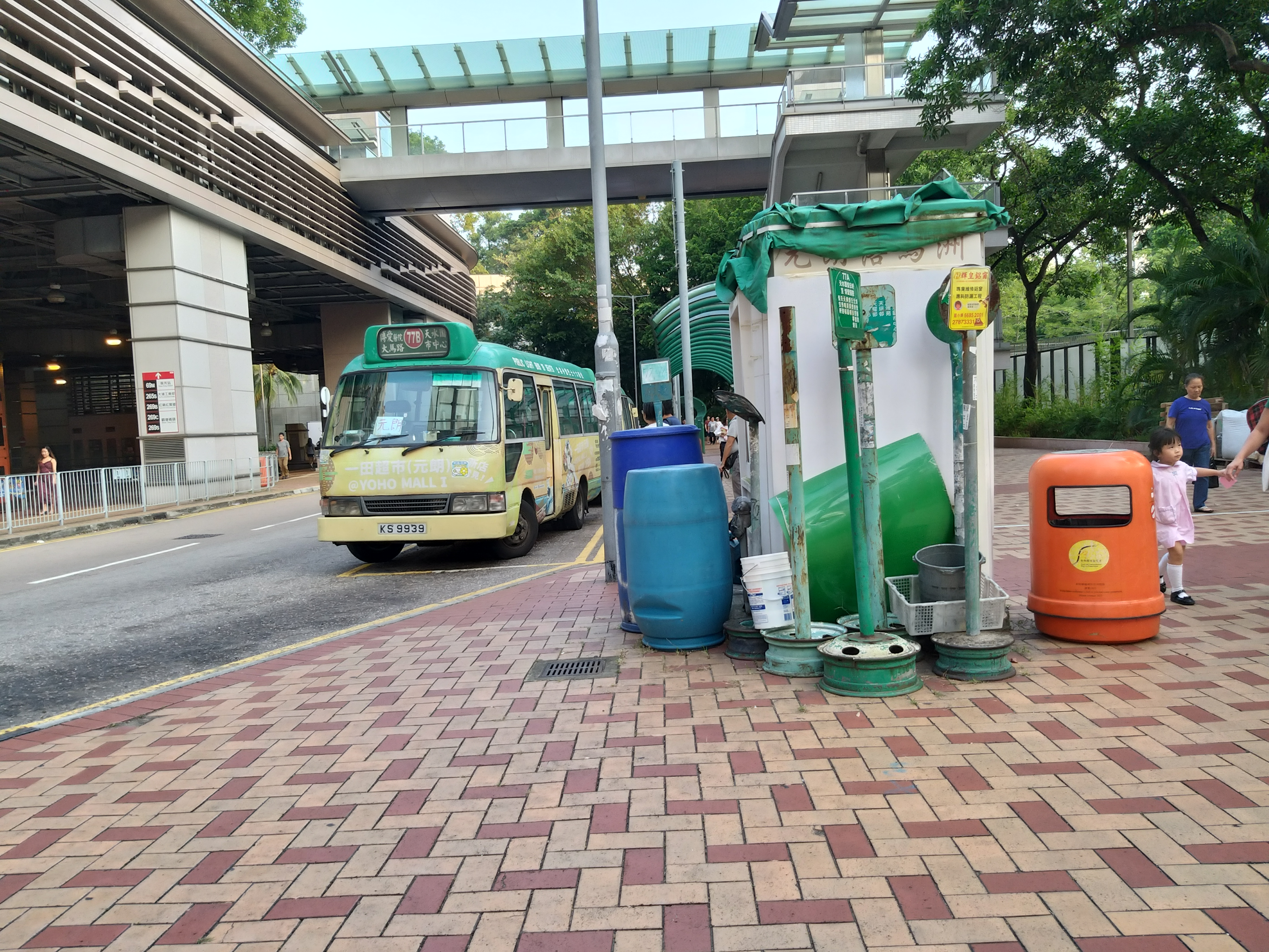 中文（香港）: 77號線小巴在天水圍市中心的總站